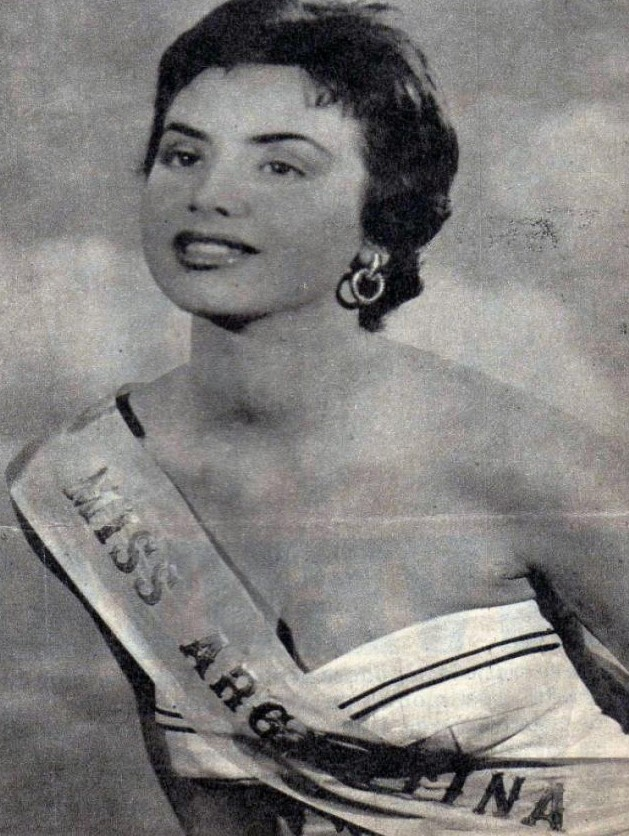 Isabel “la Coca” Sarli cuando fue elegida “Miss Argentina” en 1955.